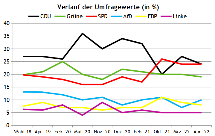 Hessen-Wahl 2023 Umfragen